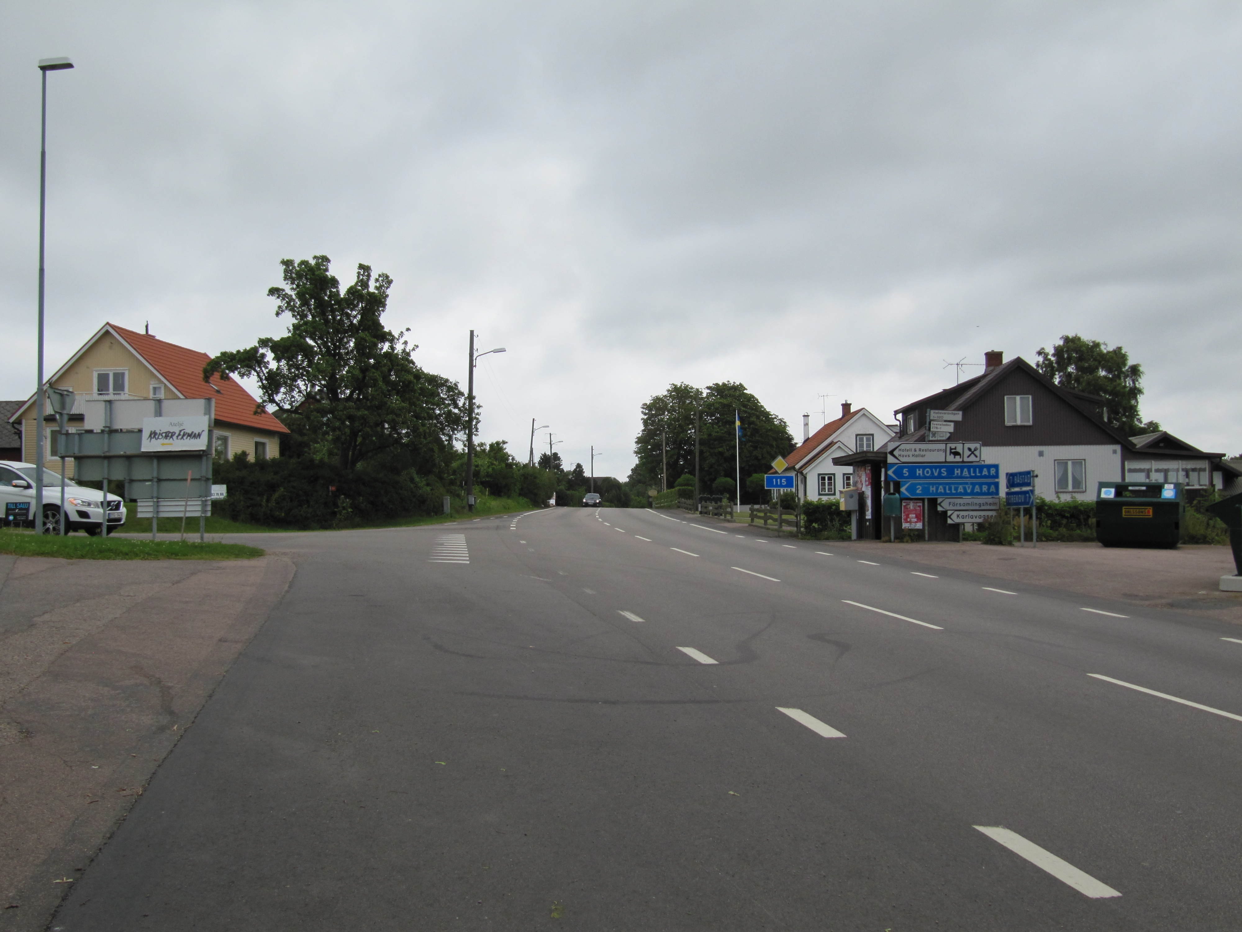 Länsväg 115 vid Hov